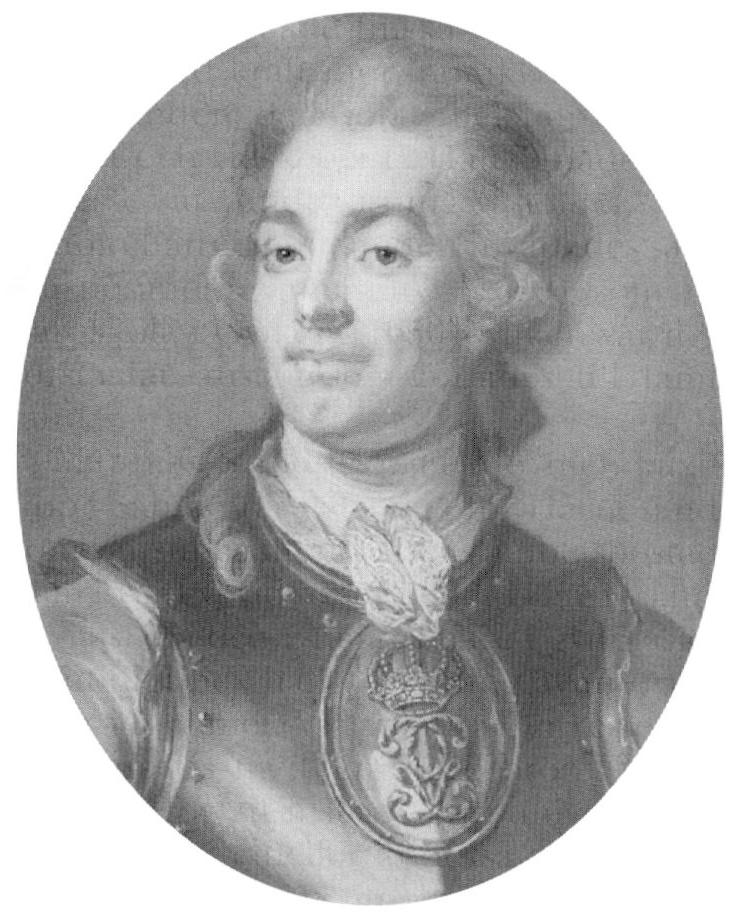 photo Svenska Porträttarkivet, SPA.